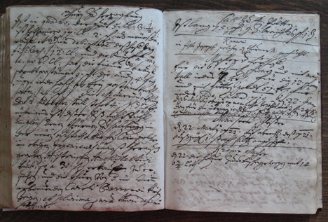 Kalender des Dürnsteiner Propsts Hieronymus Übelbacher, 1721, Stiftsarchiv Herzogenburg